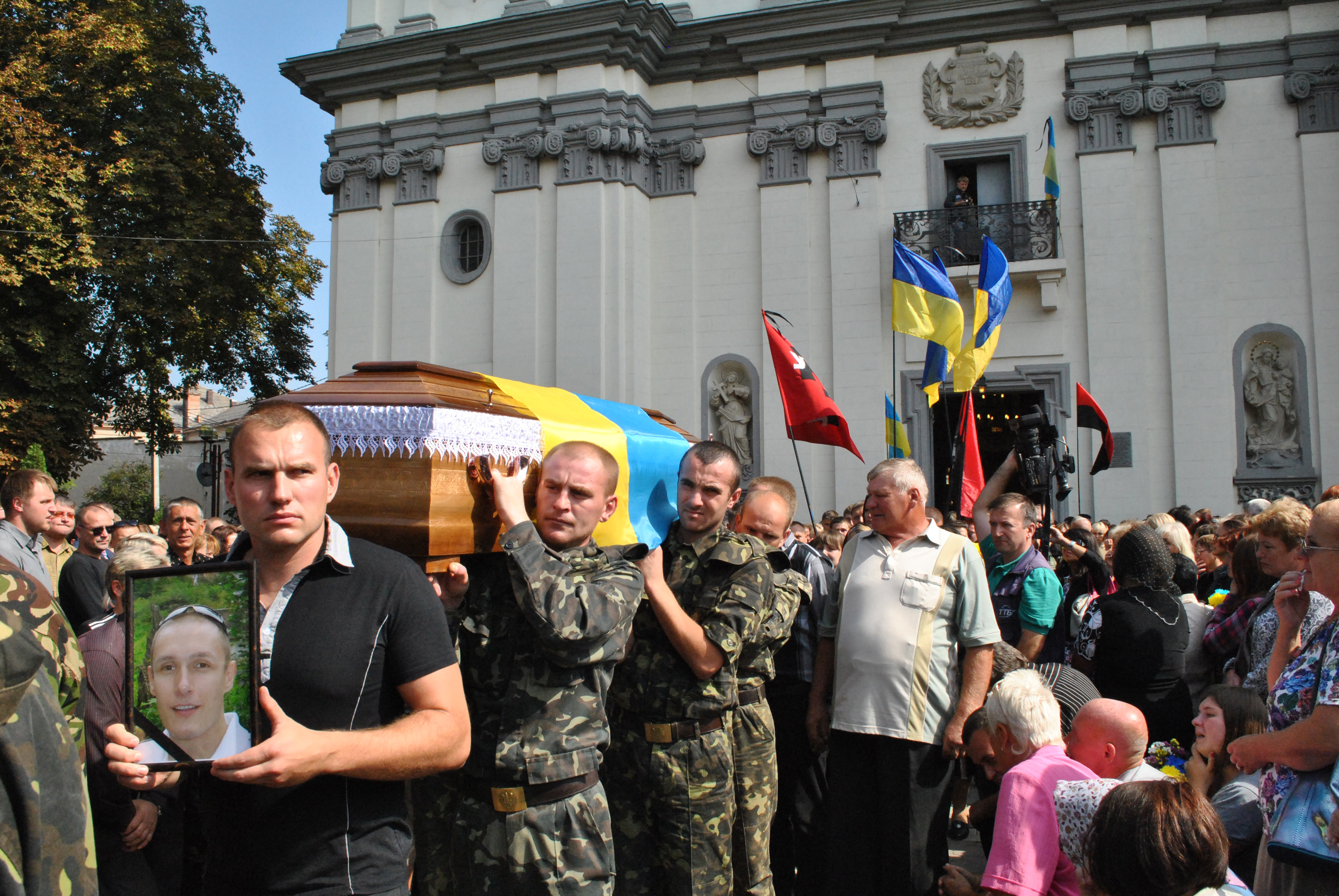 Похорон командира 2-го взводу 2-ї роти «Захід» 24-го батальйону територіальної оборони «Айдар», активного учасника Революції гідності Юркевича Андрія Михайловича 11 вересня 2014 року.